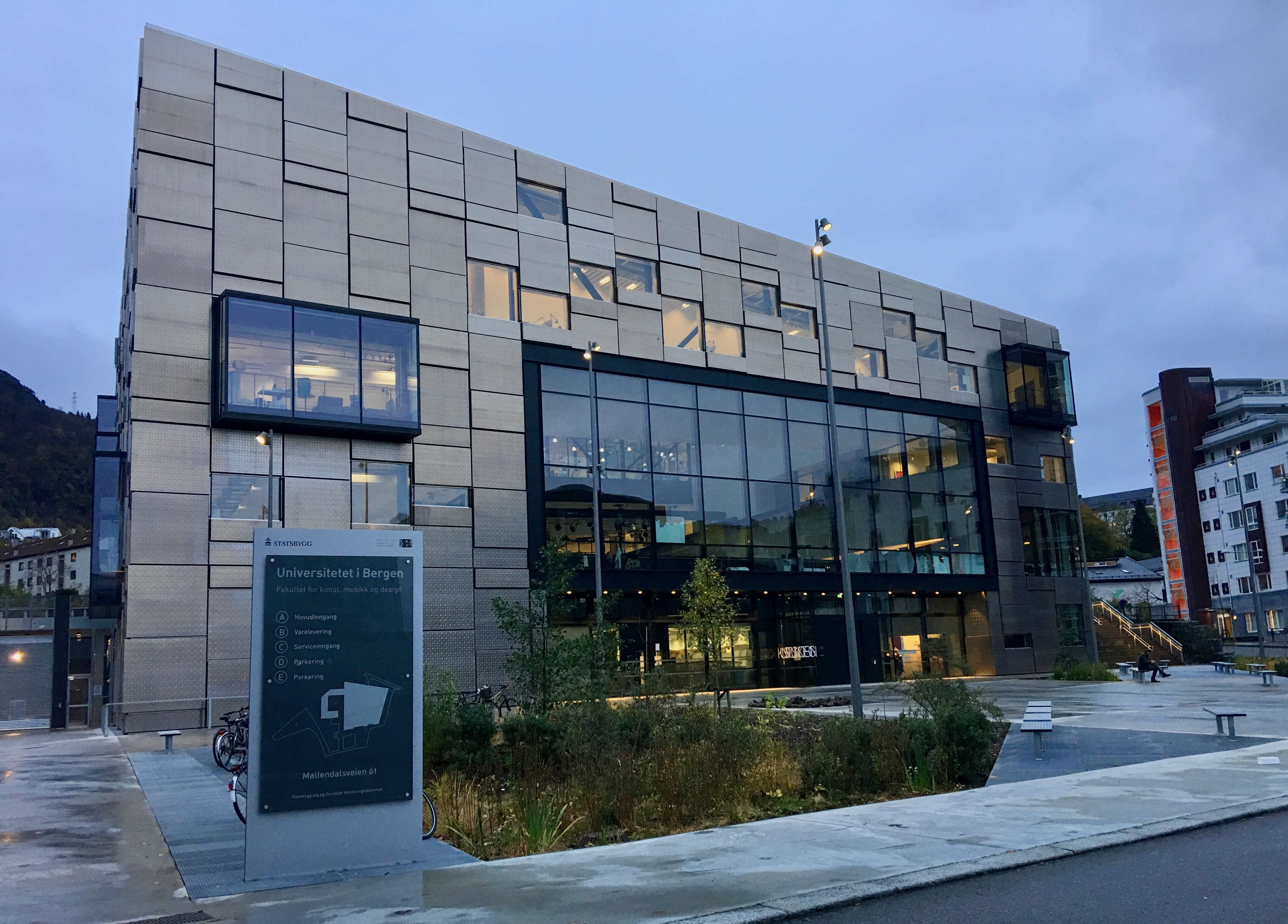 Fakultet for kunst, musikk og design ved Universitetet i Bergen i Møllendalsveien 61 i Bergen (nytt bygg tatt i bruk høsten 2017). Oktober 2017.